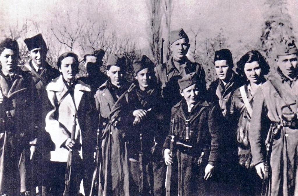 Delegacija Druge proleterske udarne brigade pred polazak na Kongres USAOJ-a, decembra 1942. godine u oslobođenom Livnu.